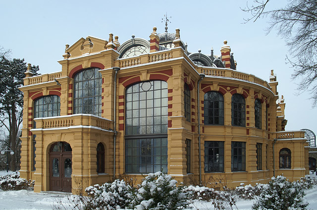 Kurhaus Augsburg-Goeggingen